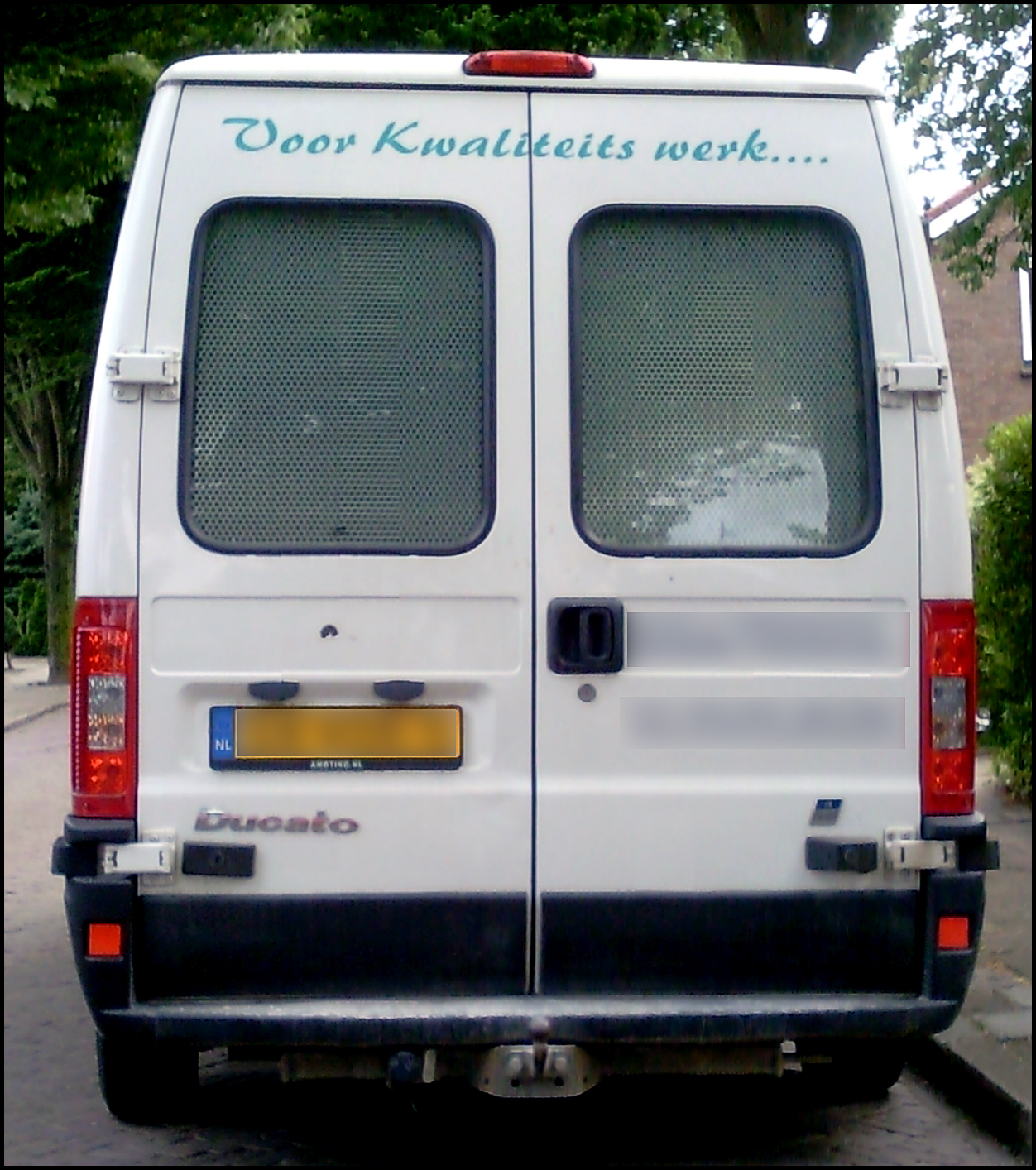 Pijnlijk als je kwaliteitswerk zegt te leveren, maar niet blijkt te weten hoe je dat eigenlijk spelt. In het maatschappelijk leven kunnen zulke spelfouten de betrouwbaarheid van een hele onderneming negatief beïnvloeden. Voor de goede orde: Een samenstelling is één woord, en wordt in het Nederlands als één woord geschreven: meestal aaneen, onder bepaalde voorwaarden met een koppelteken, maar nooit met een spatie.